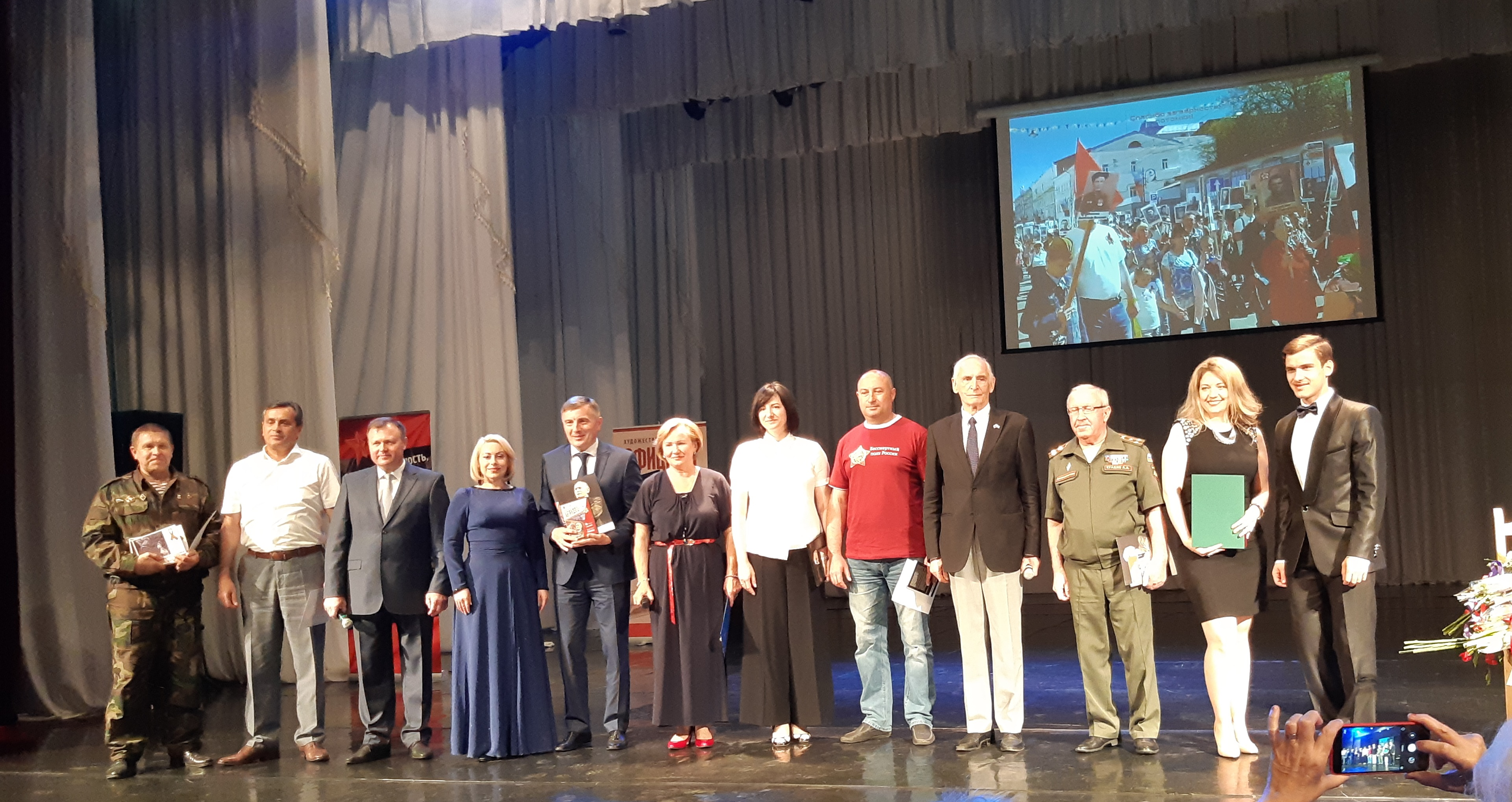 Лановой В. С. на акции Спасибо за верность, потомки! в Адыгее 19.06.2018